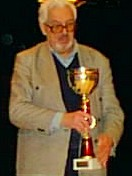 Vladimir Bagirow, 8. Weltmeisterschaft der Senioren vom 8. bis 21. November 1998 in Grieskirchen / Österreich.